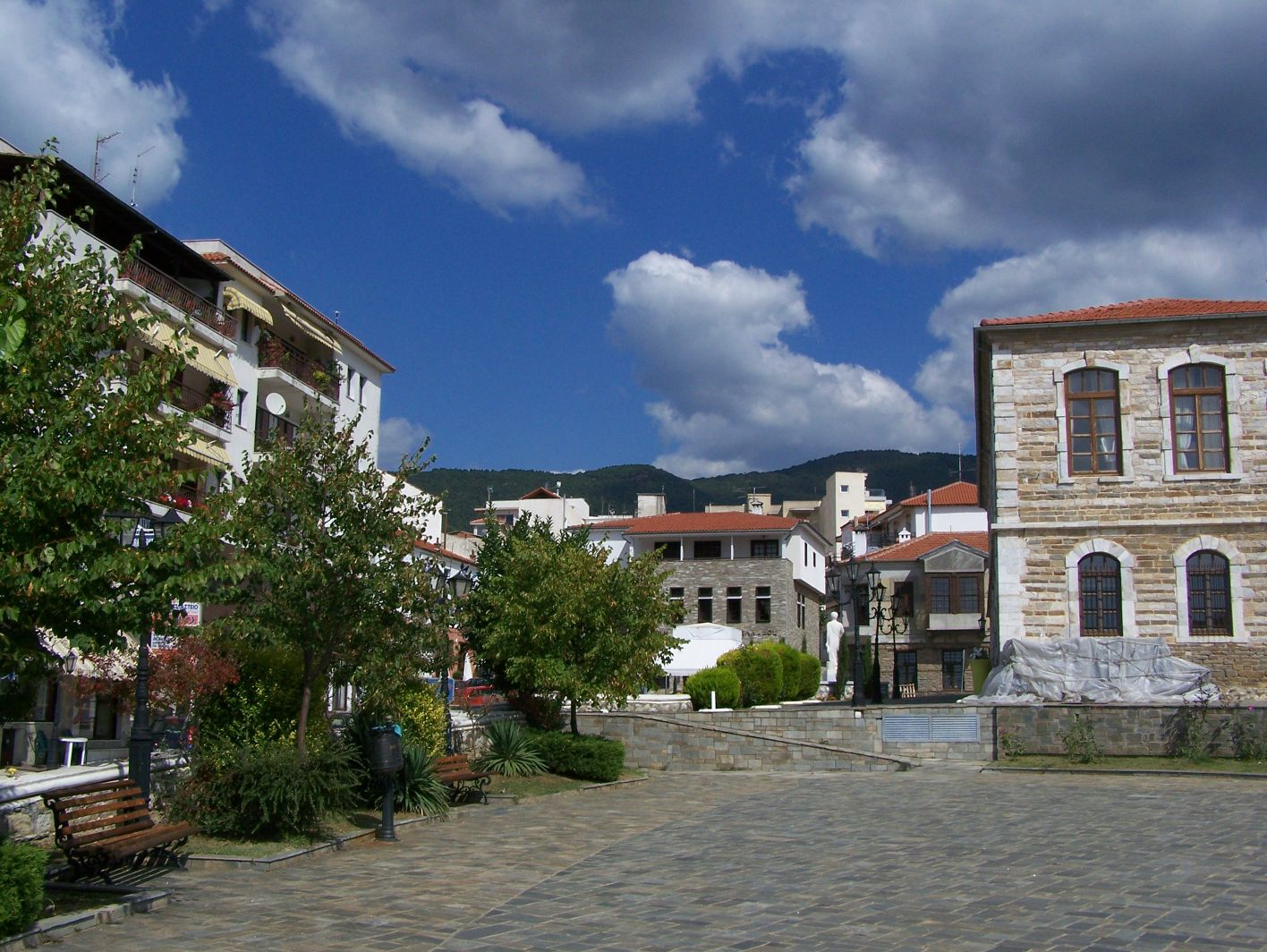 Stadtansicht von Polygyros